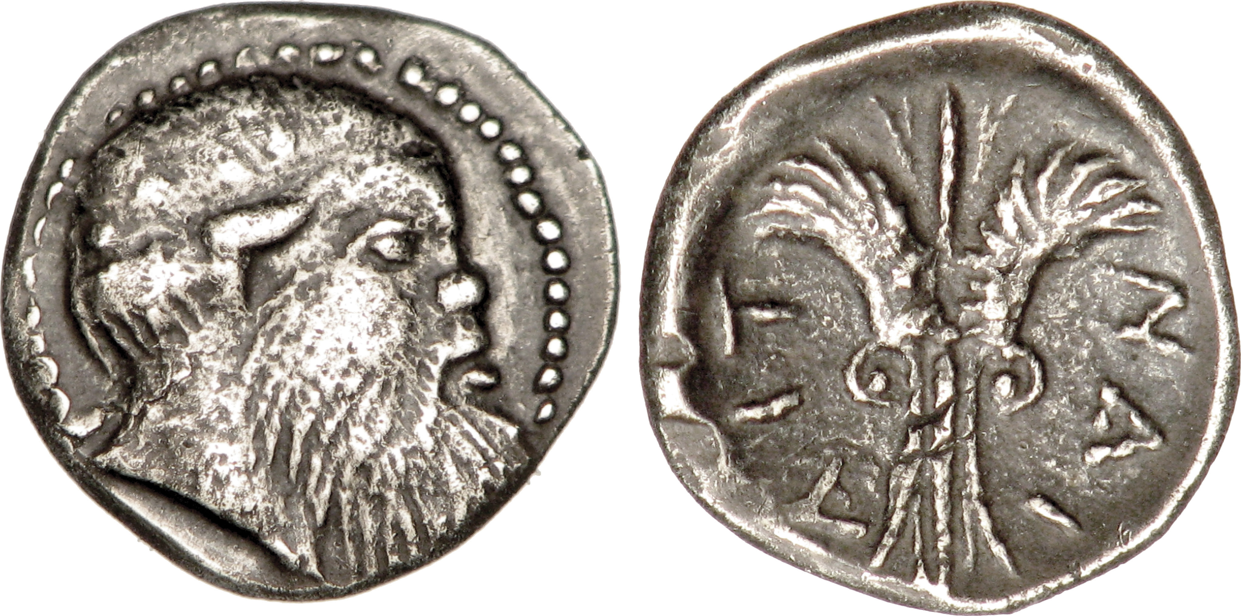 Nom de l'atelier : Sicile, Catane Métal : argent Diamètre : 10,5mm Axe des coins : 5h. Poids : 0,65g. Description avers : Tête de Silène barbu et cornu ; grènetis circulaire perlé. Titulature revers : AIT/NAI. Description revers : Foudre vertical ailé. Traduction revers : (Aitna).